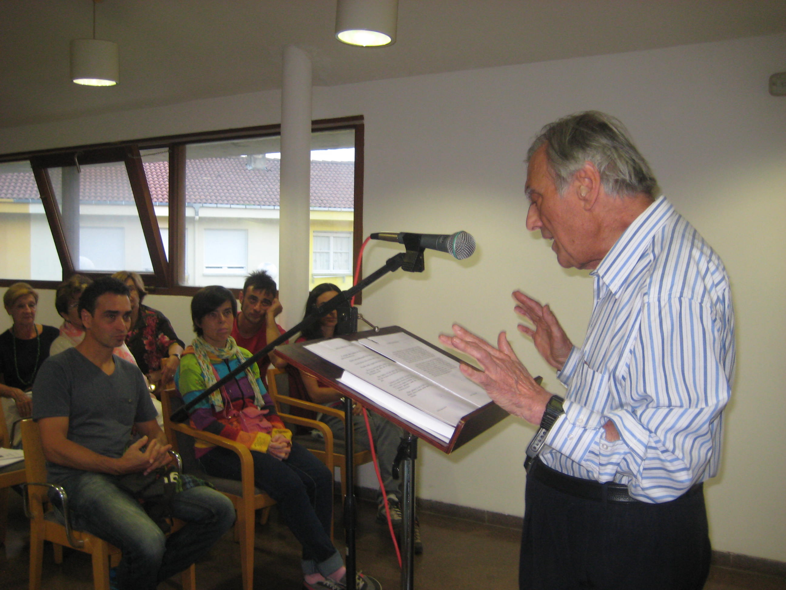 Lecturas con autores